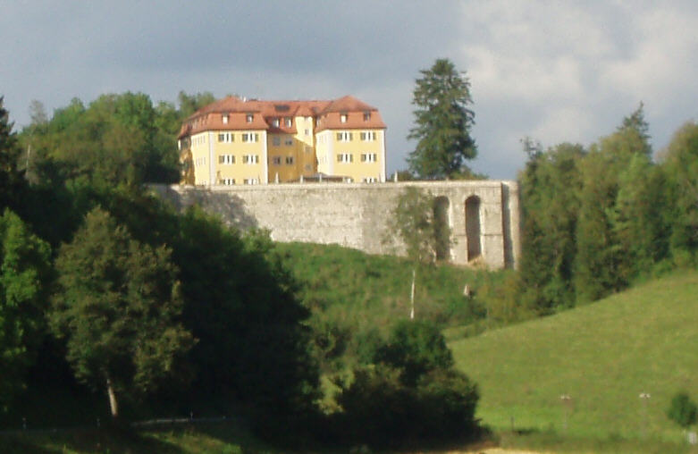 Grafeneck